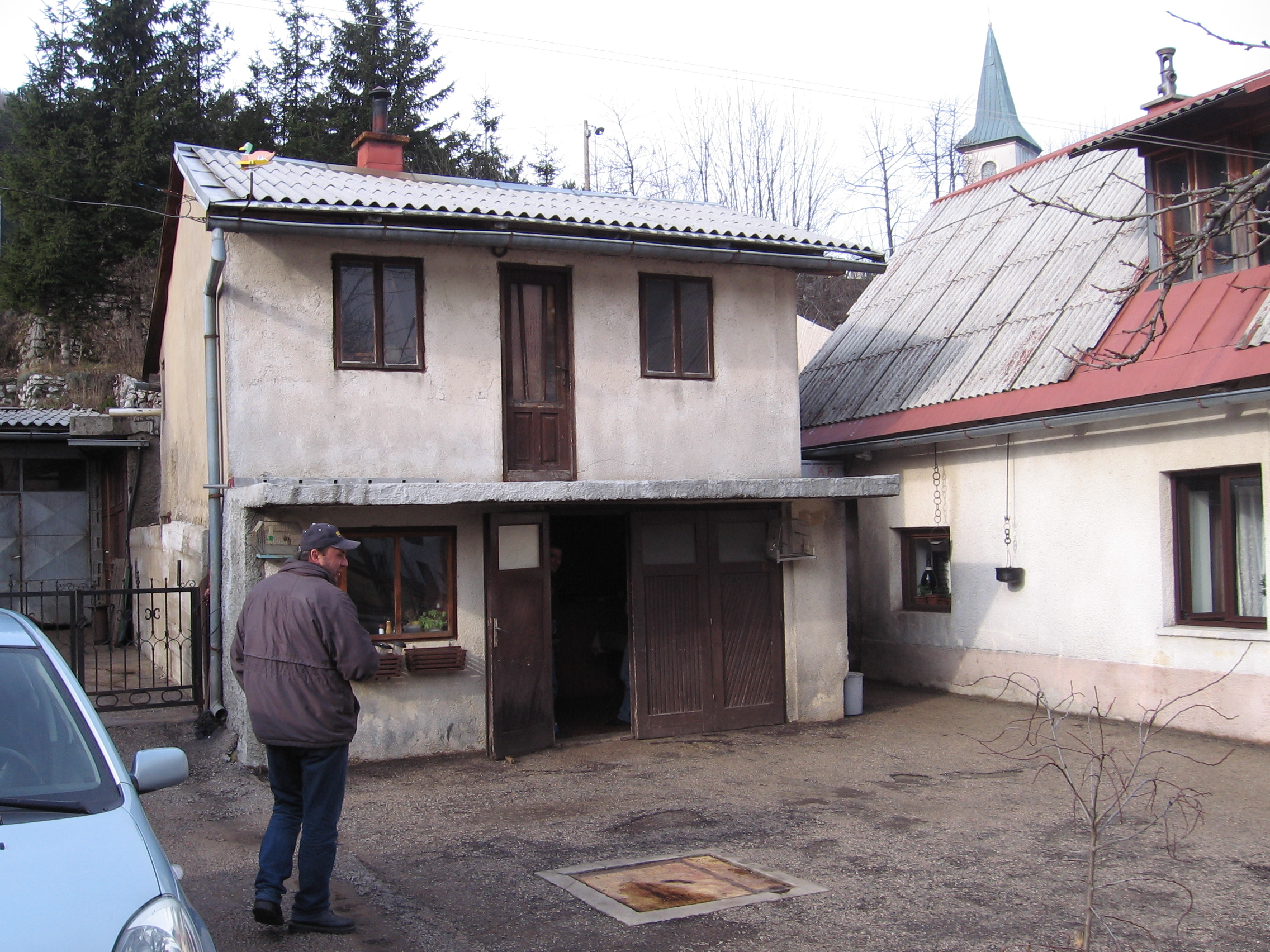 Radoševići, Lič, Vlasništvo, Zeljko